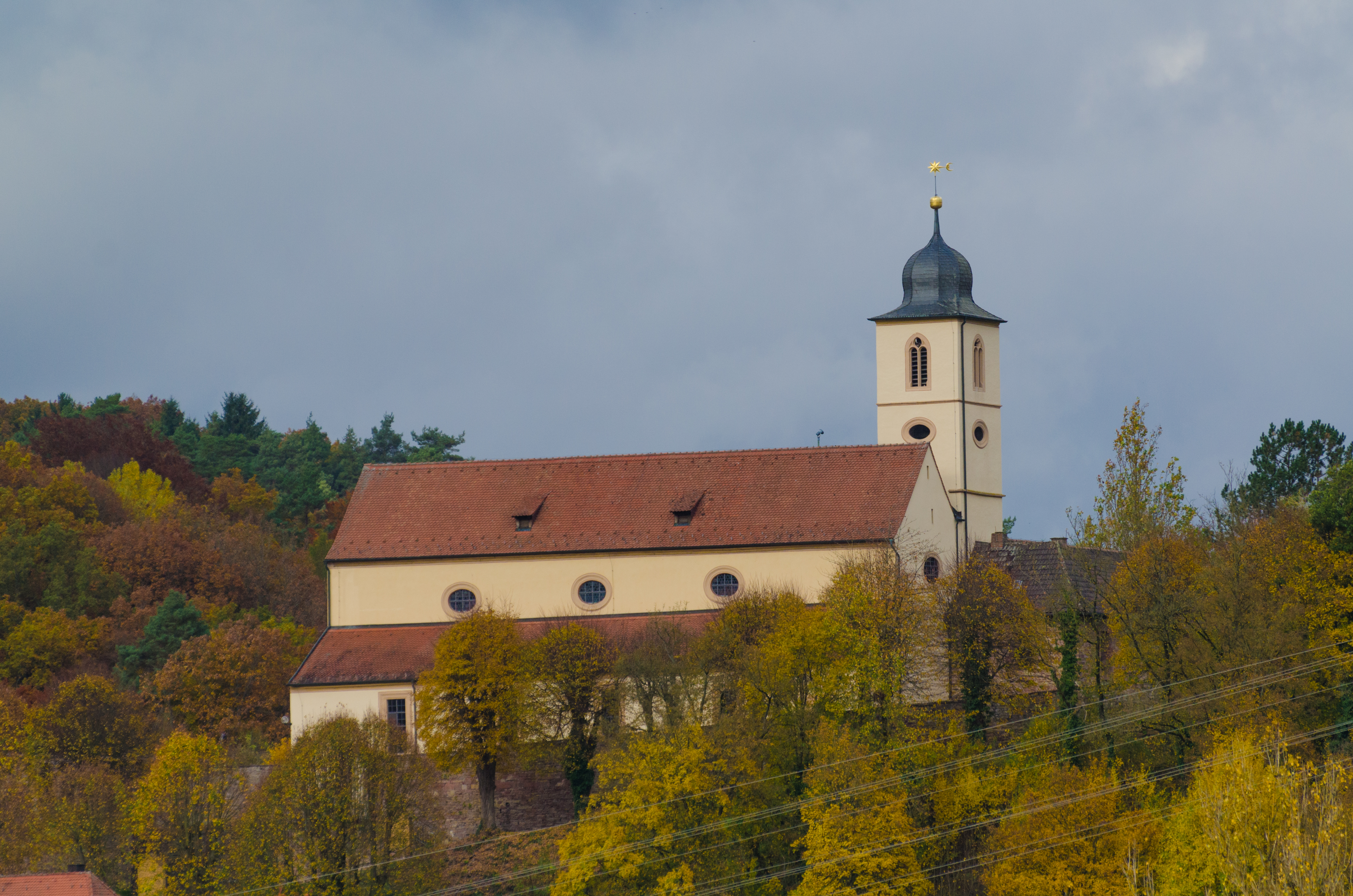 Aura a.d. Saale, katholische Pfarrkirche St. Laurentius